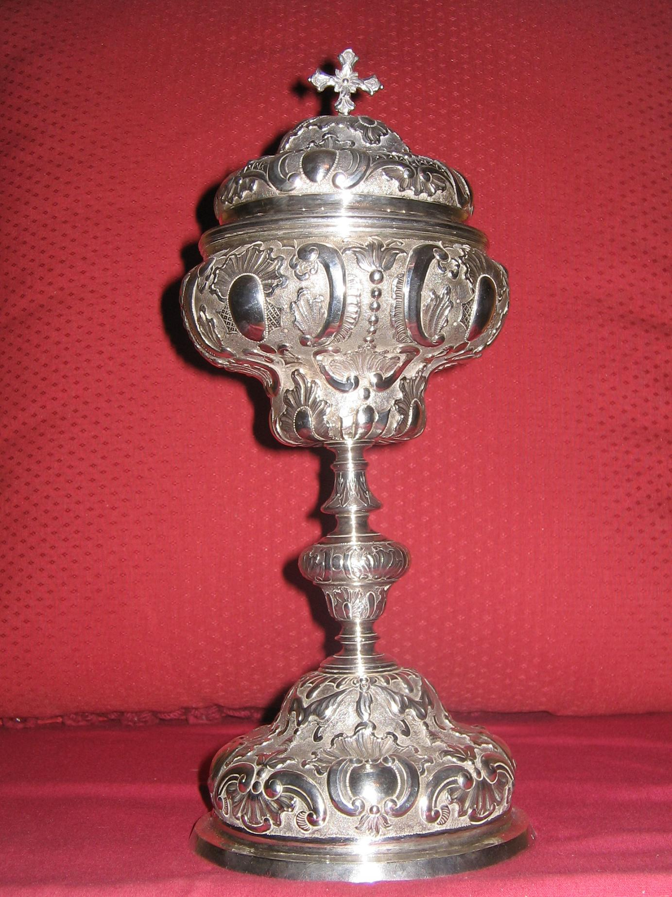 Copón Plata repujada de perfil muy sinuoso y abundante decoración barroca. Punzón "AZNAR II OSCA" Buena pieza